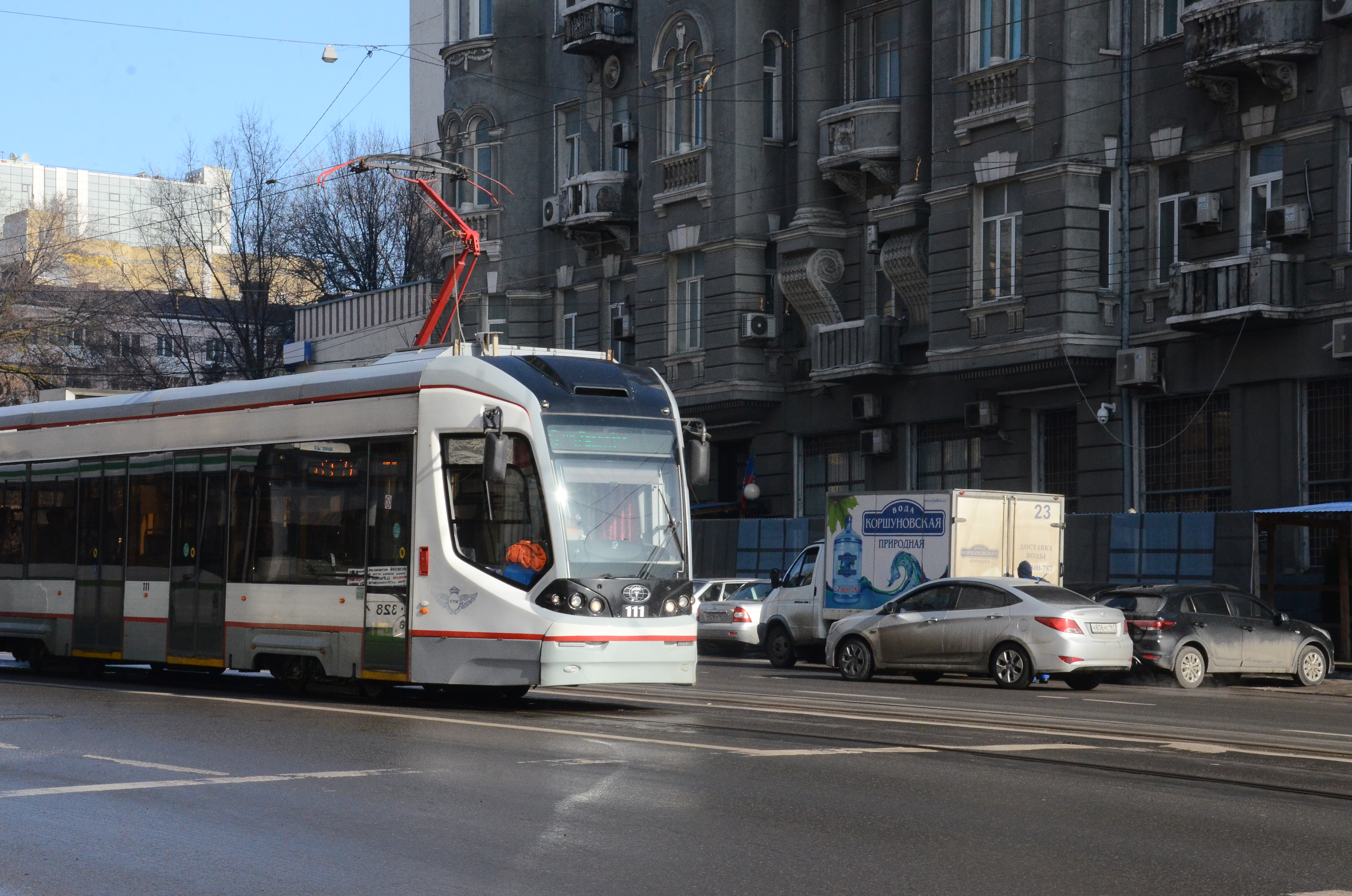 Ростов-на-Дону